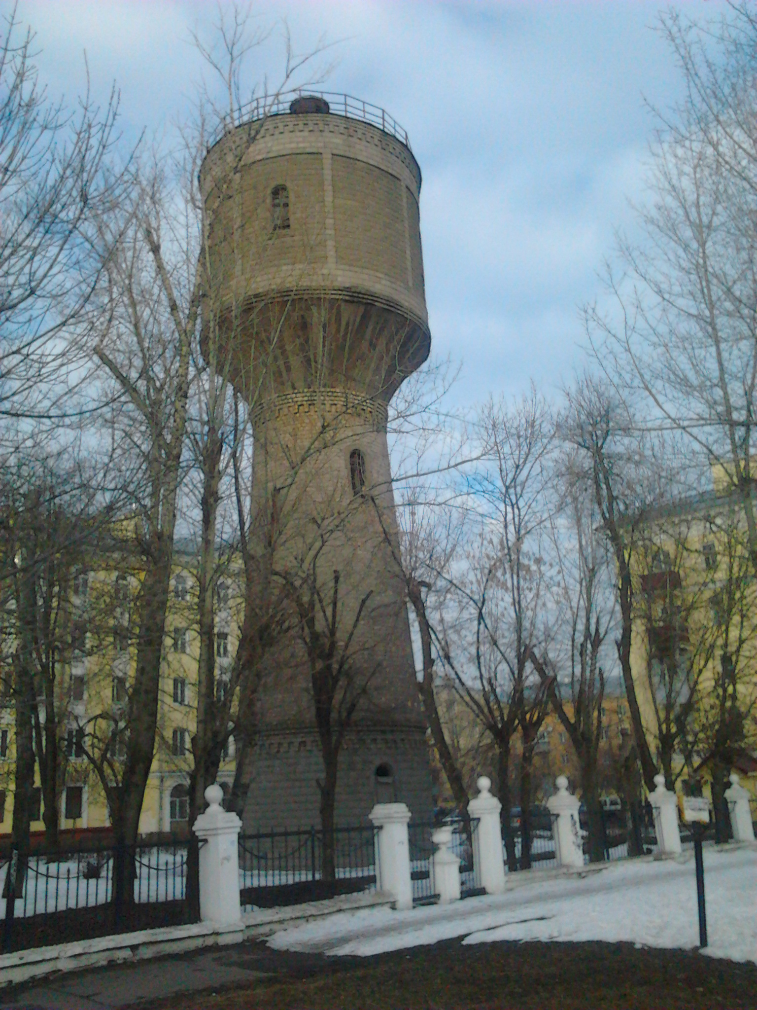 Башня